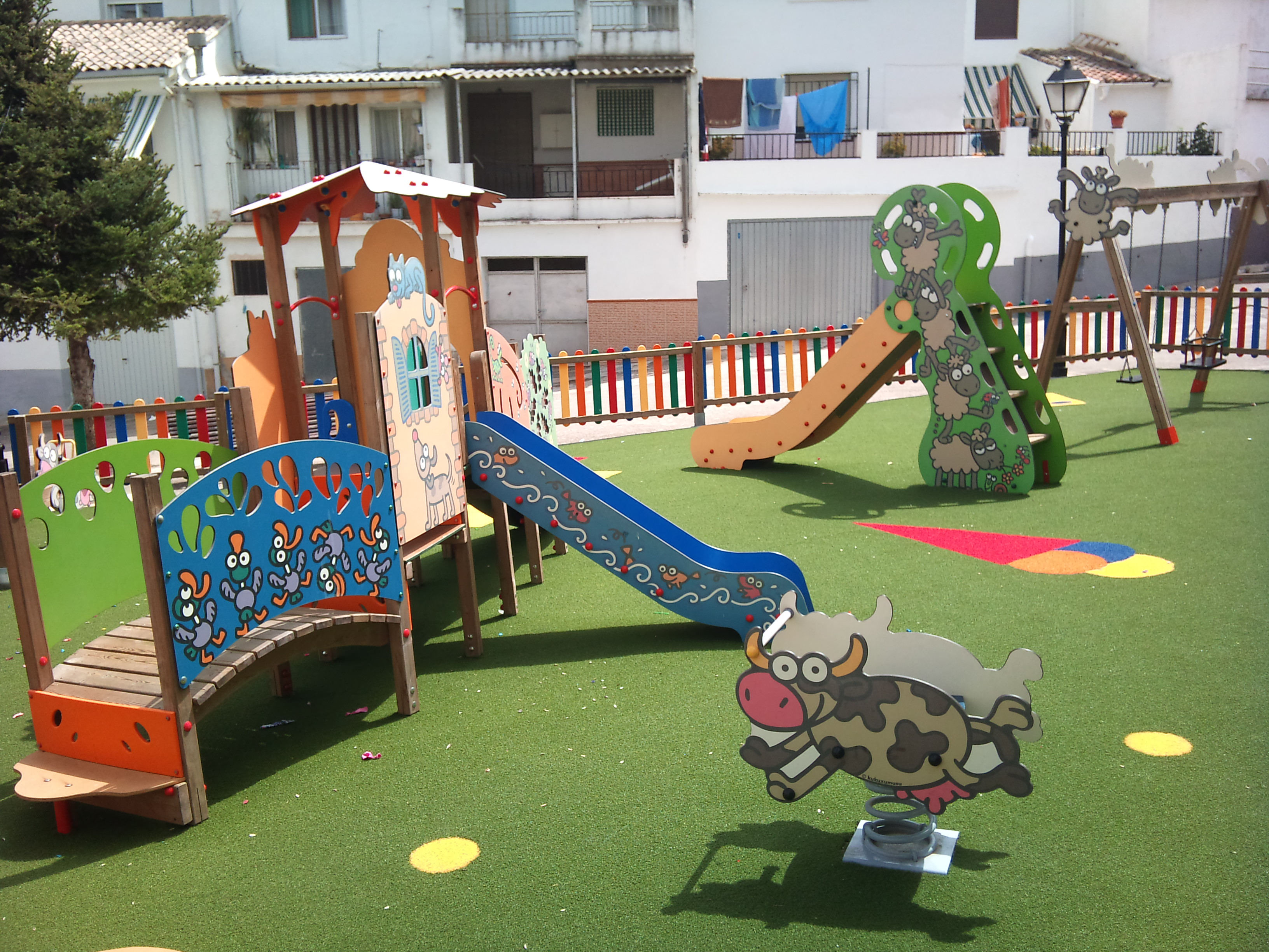 Parc infantil decorat amb motius de Kukuxumusu a Benimarfull, el Comtat